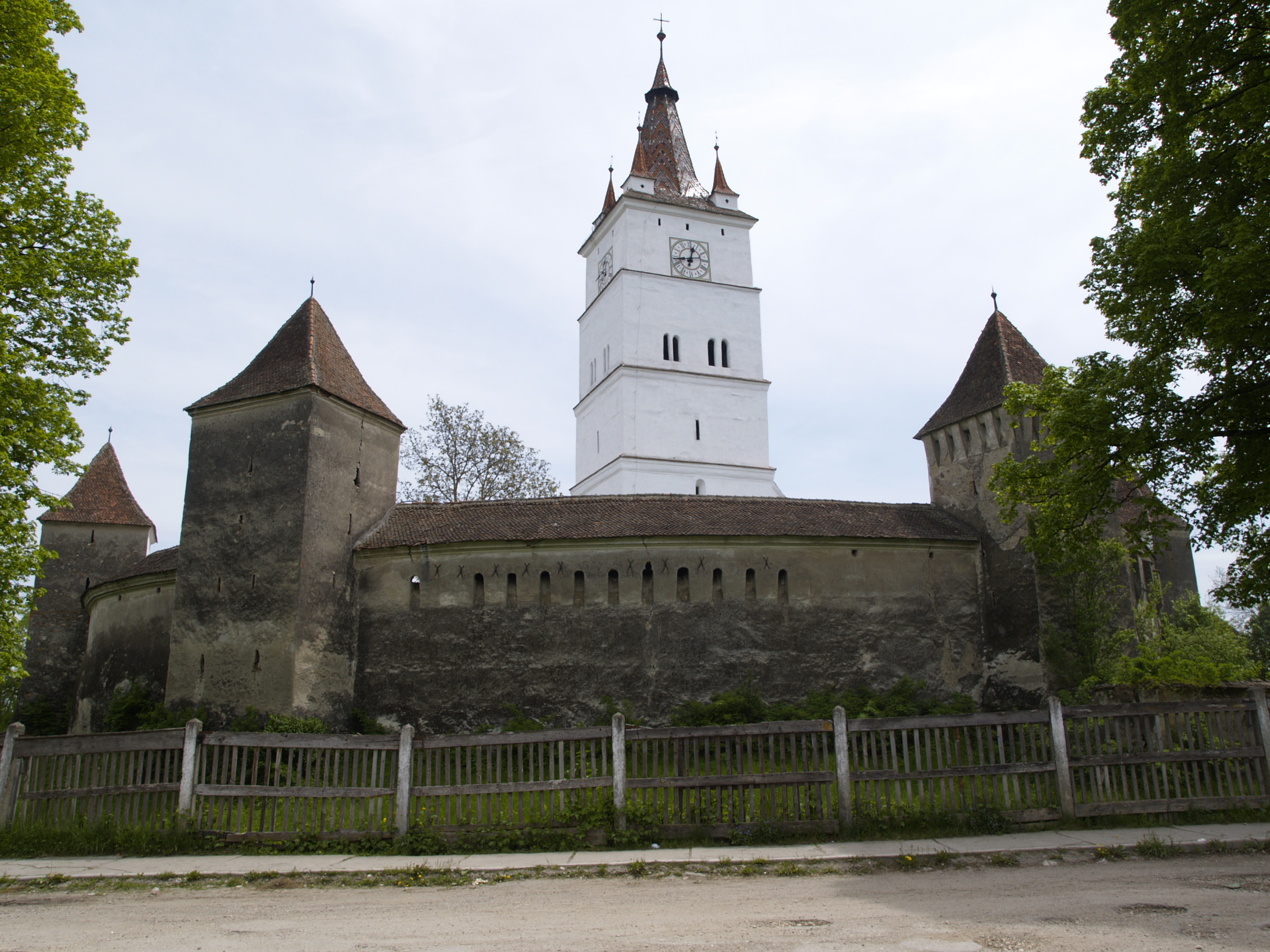 Honigberg (Hărman): Kirchenburg, Siebenbürgen, Romania